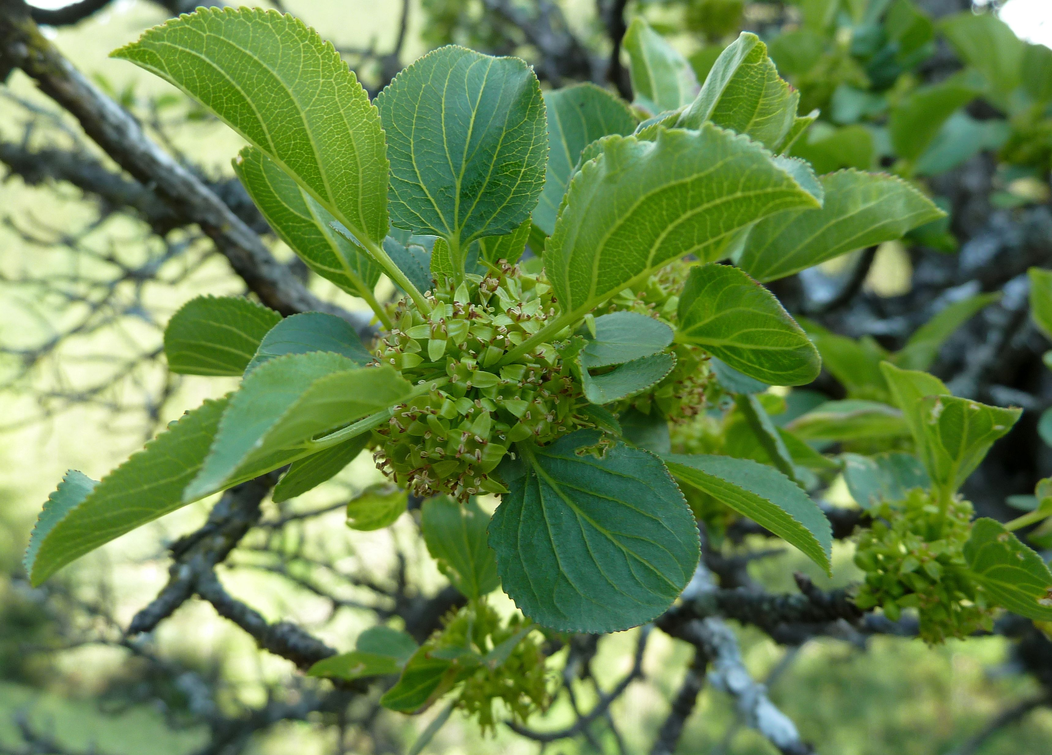 Rhamnus cathartica (Purgier-Kreuzdorn), von altem Baum im Gantergrund nähe Simplonpass im Juni 2011 aufgenommen.